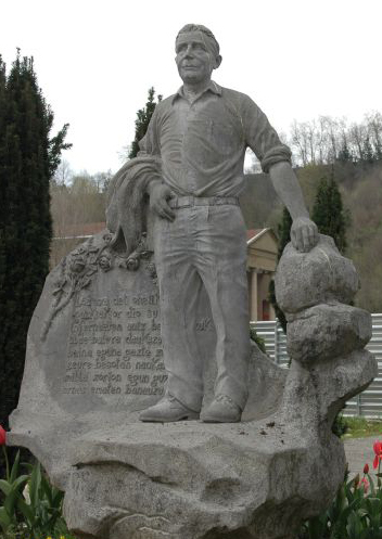 Lazkao Txikiren omenezko eskultura, Lazkaon.